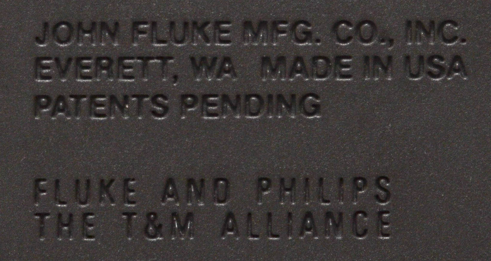 Tekst op achterzijde van Fluke 87 multimeter